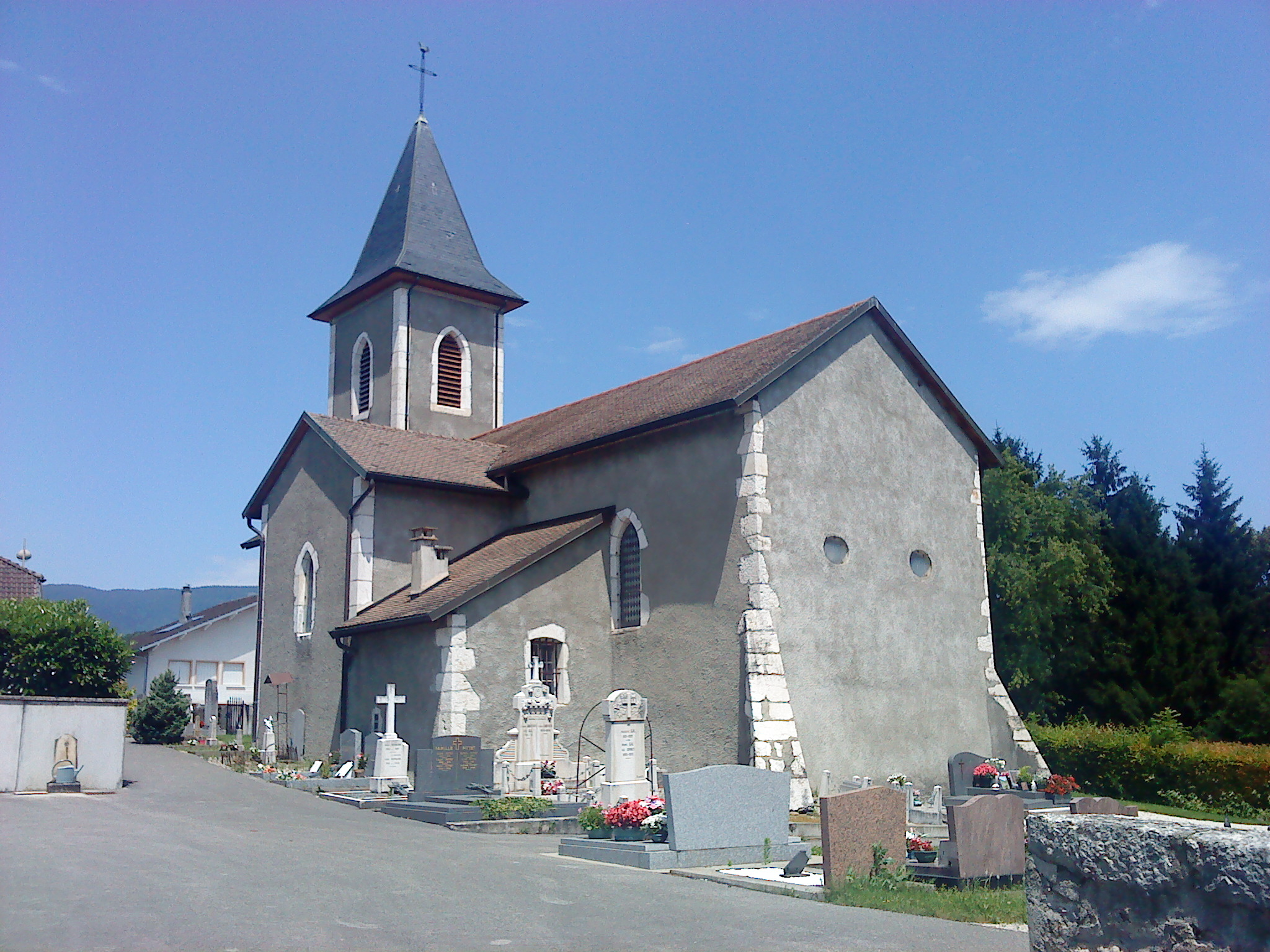 Eglise Saint-Maurice de Sauverny, Ain, France